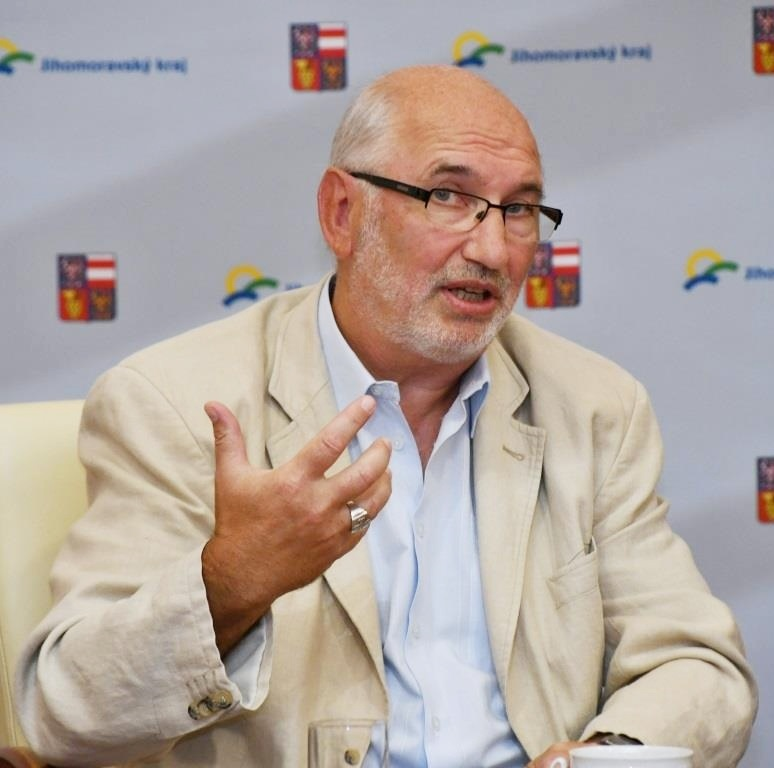 Lukáš Evžen Martinec (2018)